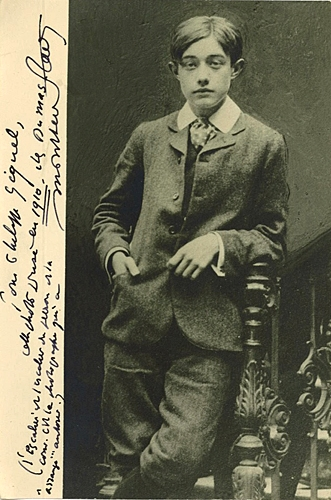 Photo dédicacée de Henry de Montherlant (1910) à Philippe Giquel. Extraite et retouchée d'une photo de classe de l'école Saint-Pierre à Neuilly. Collection Marie-Christine Giquel. Photographe inconnu. Texte : "“Pour Philippe Giquel, cette photo prise en 1910, chez Dumas (école St-Pierre, NdR) - (l’escalier est celui du perron de la cour. C’est le photographe qui a “arrangé” autour)”."